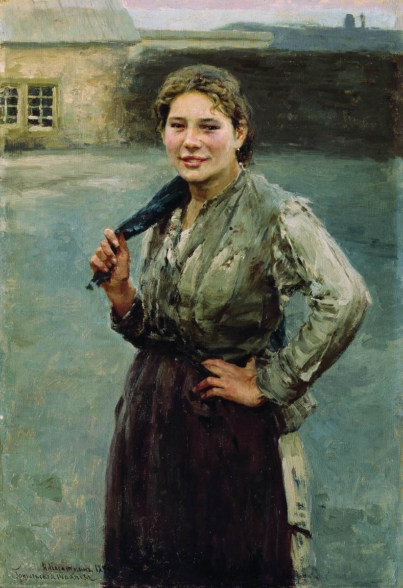 Шахтерка. 1894. Холст, масло. Государственная Третьяковская галерея, Москва